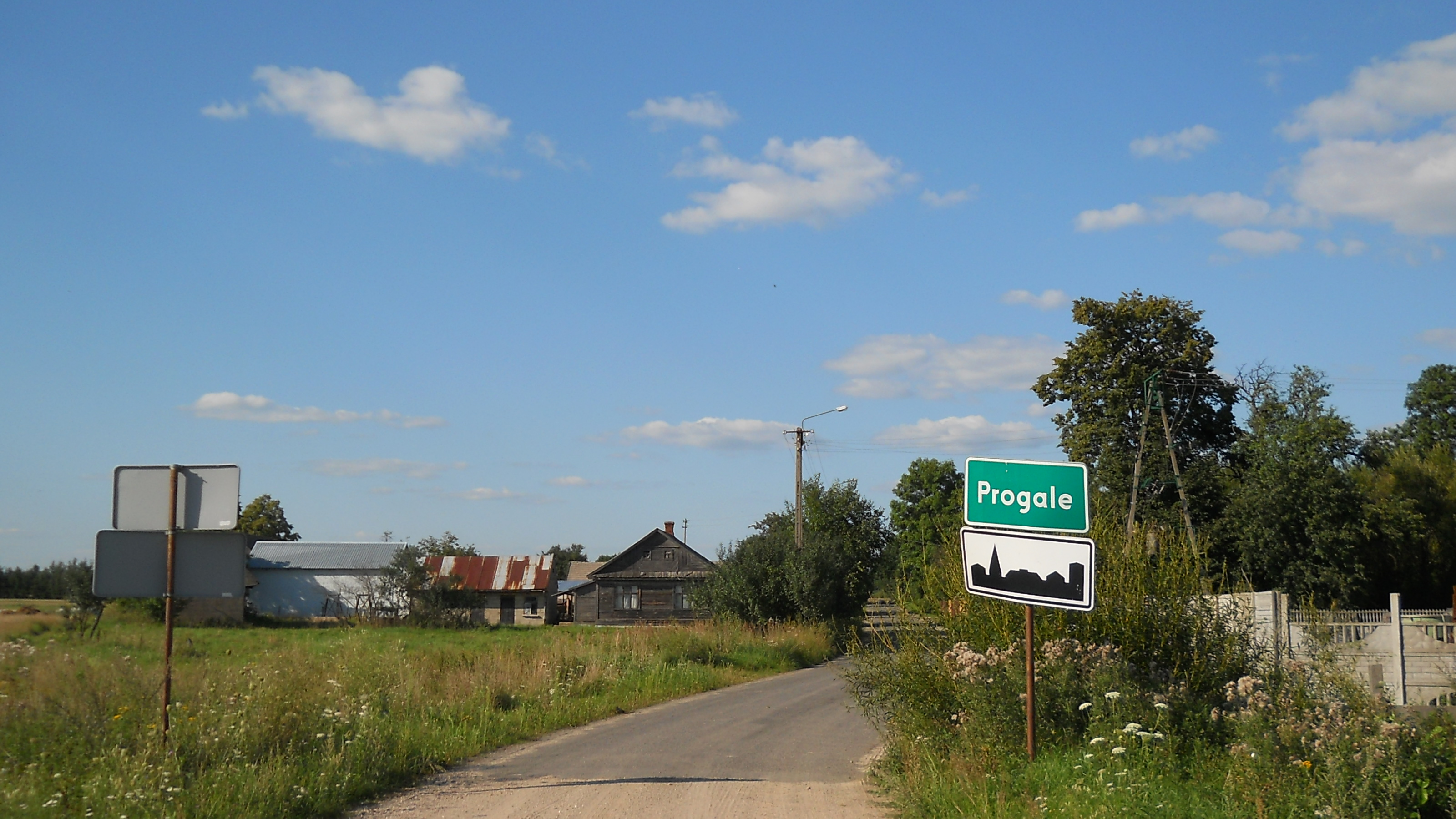 Progale